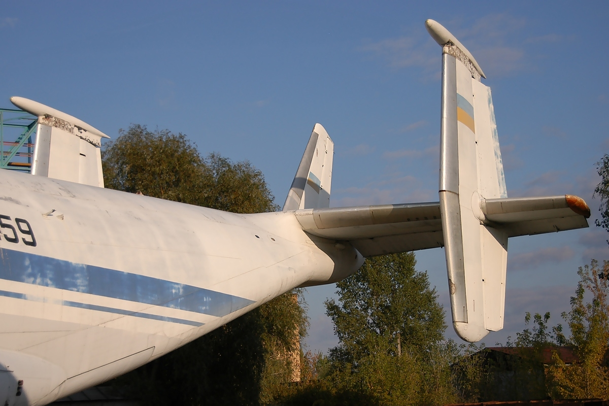 Antonov An-22PZ (UR-64459 (cn 5340101))